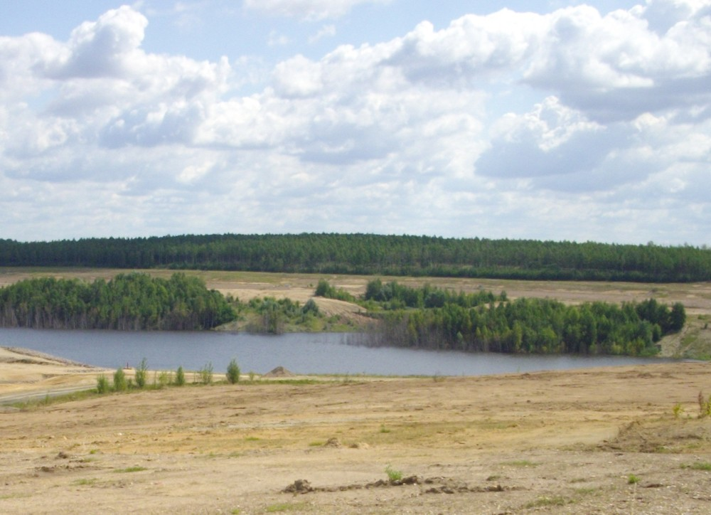 Tagebaurestloch mit dem sich in Flutung befindlichen Zwenkauer See und Neue Harth, Zwenkau, Landkreis Leipzig